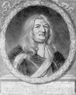 Kurfürst Friedrich Wilhelm von Brandenburg (der große Kurfürst)